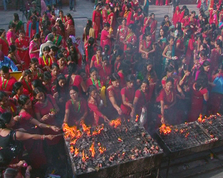 नेपाली: पशुपतिमा तीजको अवसरमा बत्ती बाल्दै महिलाहरू ।